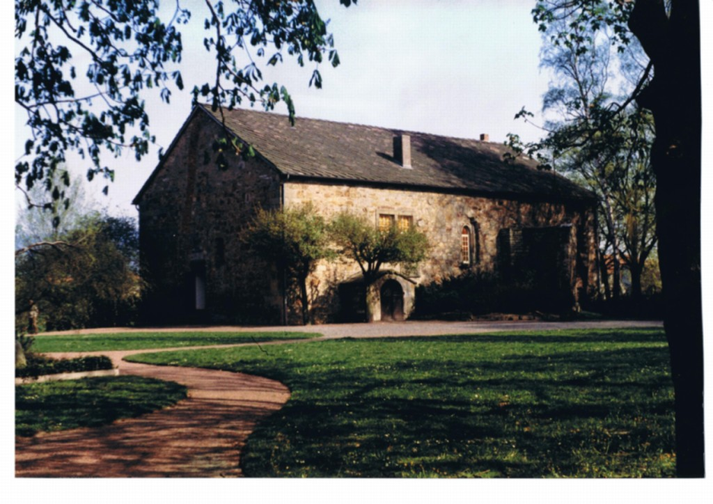 Rodenberg — Ständehaus (Heimatmuseum).